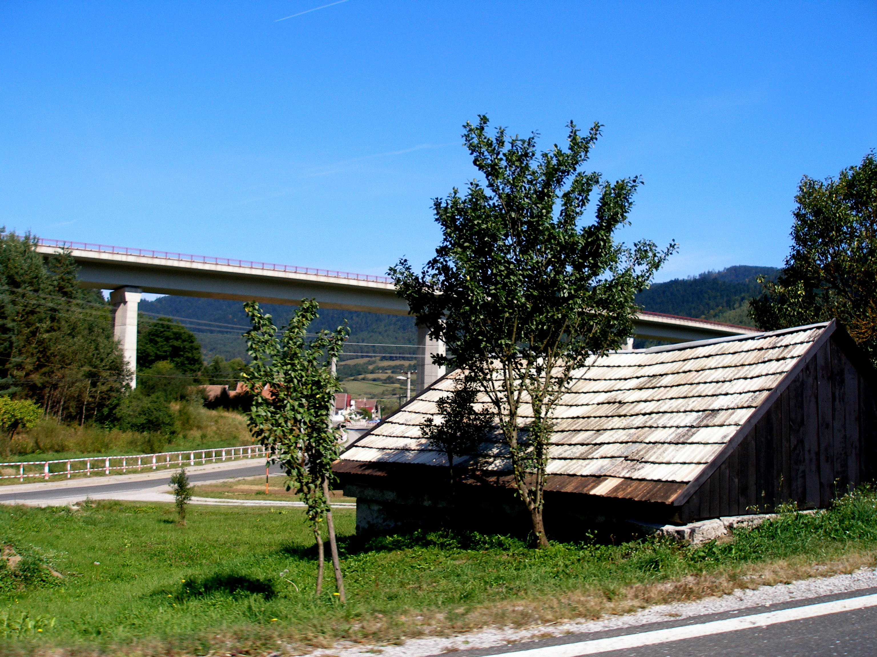 Spišská obec Korytné a okolie diaľnice D-1 pred tunelom Branisko.